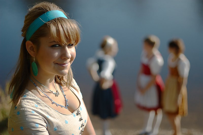 Beispiel für Bildgestaltung in der Photographie (Hauptmotiv - Nebenmotive / Einsatz von Tiefenschärfe zum Hervorheben des Hauptmotivs / Drittel-Regel für Bildaufteilung / Goldener Schnitt für Position des Gesichts)